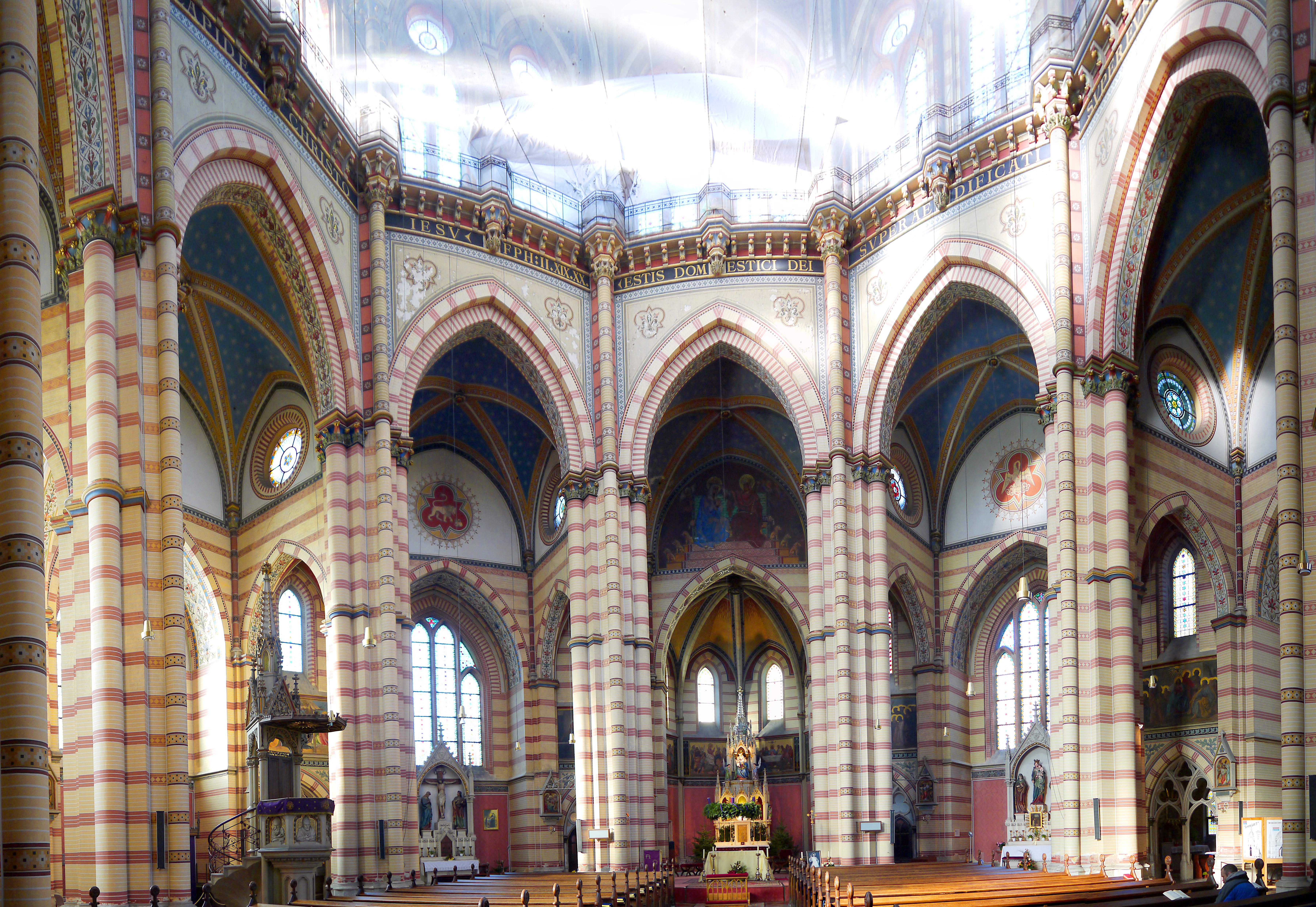 Maria vom Siege, Vienna